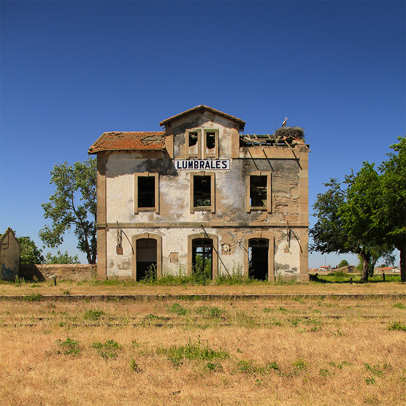 Línea férrea de La Fregeneda - La Fuente de San Esteban